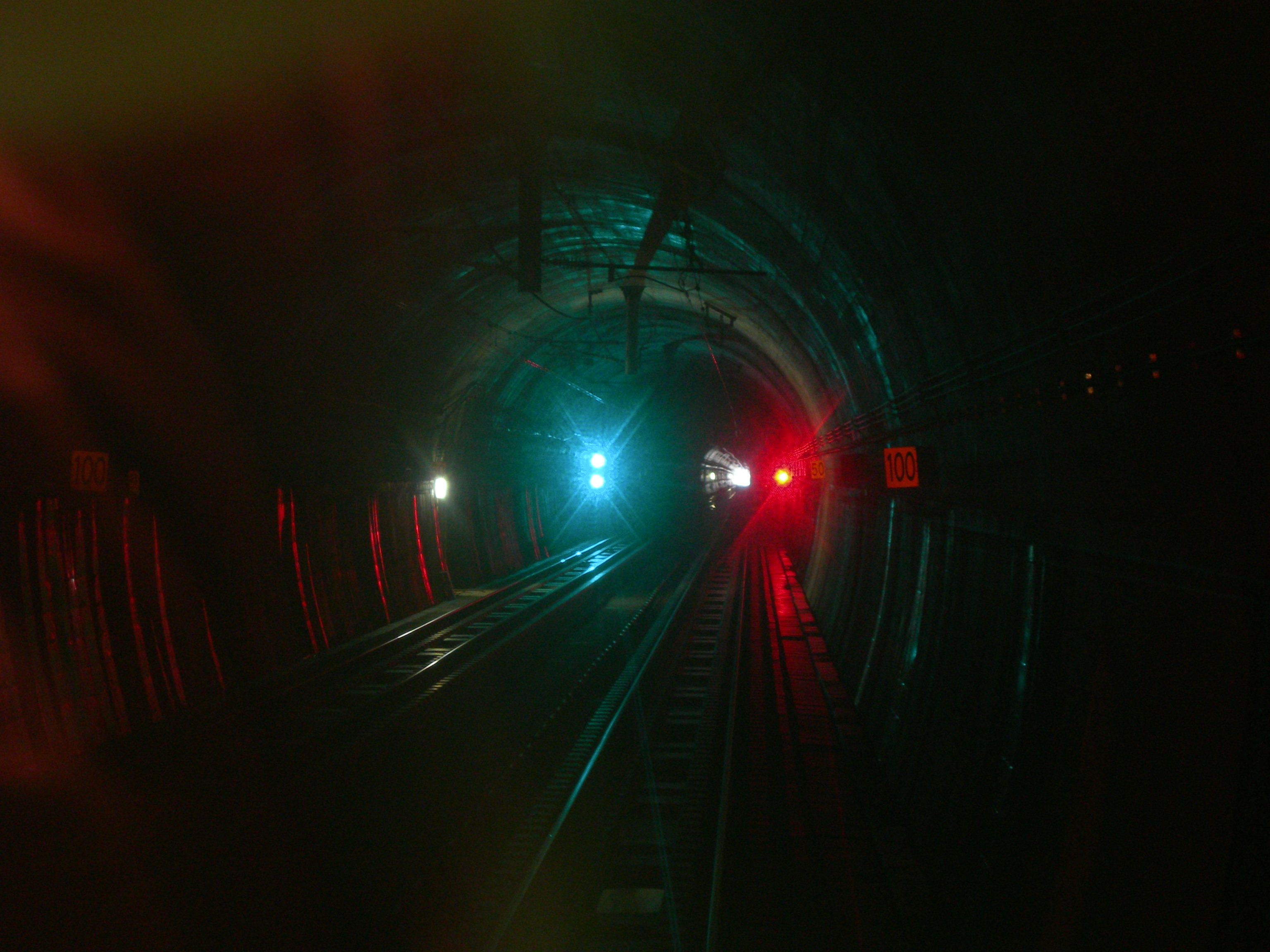 薬師峠信号場